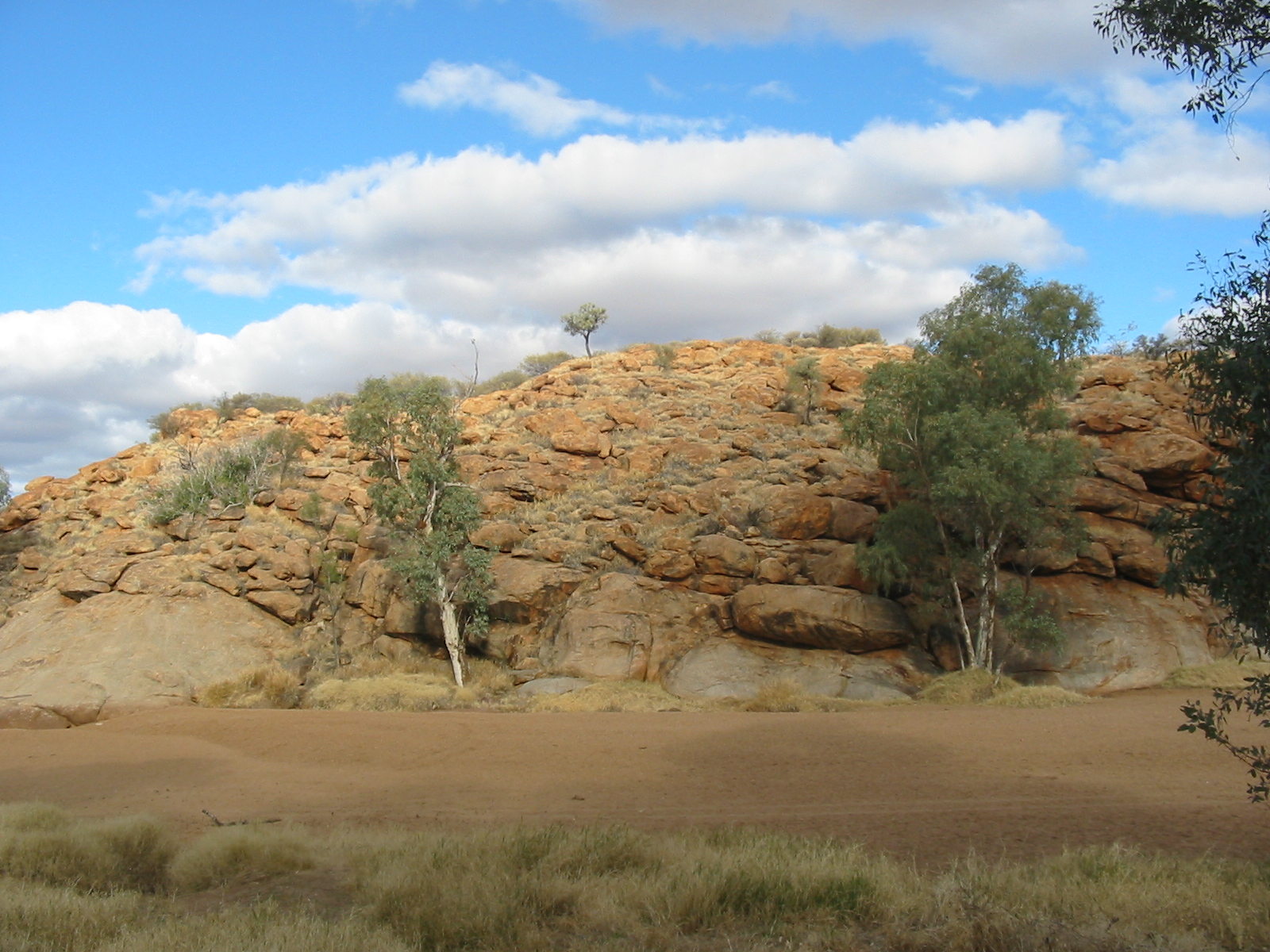 Die nach Alice Todd benannte Quelle